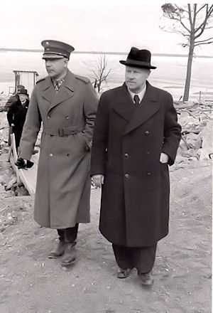 2. Divisioonan komentaja eversti Eino Koskimies.